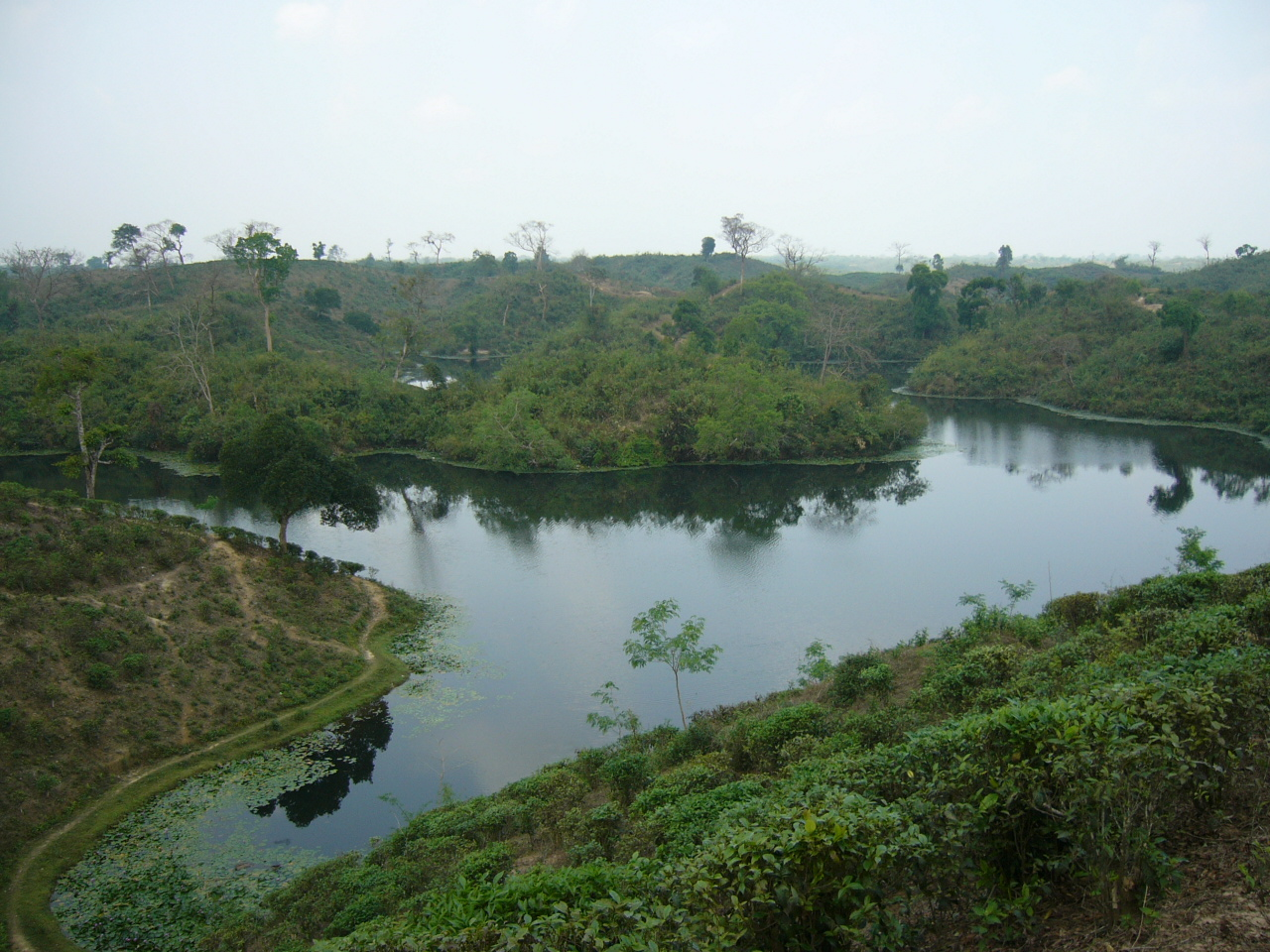 Madhobpur Lake Srimongol Sylhet Bangladesh